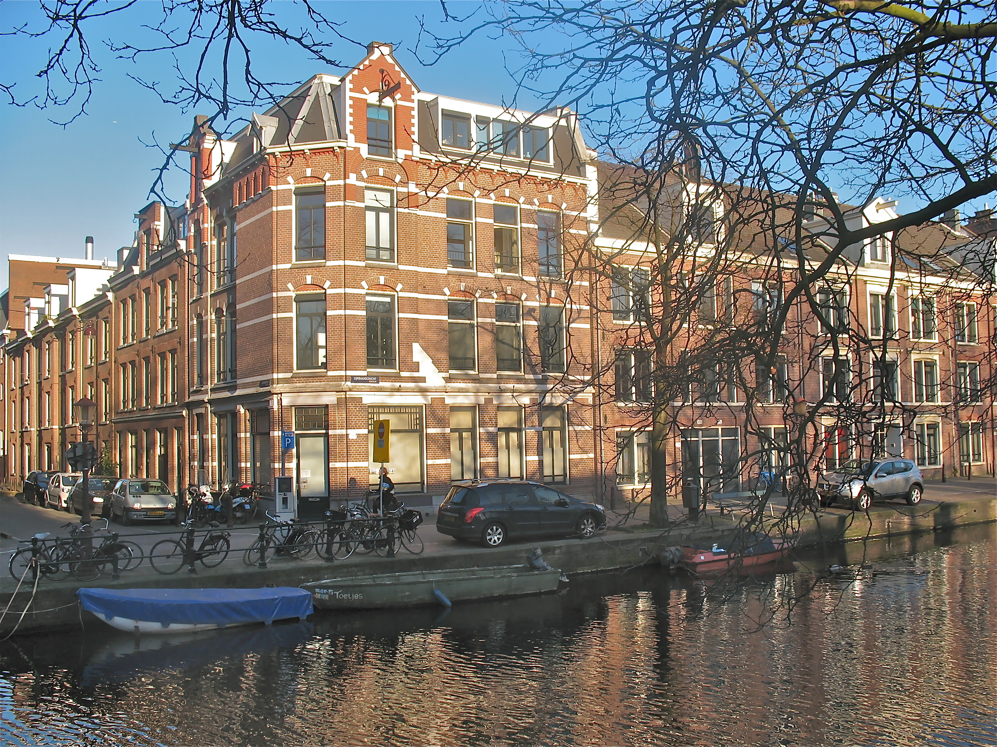 Concordia-Zuid, sociale woningbouw van 2e helft 19e eeuw hoek Lijnbaansgracht-Elandsstraat